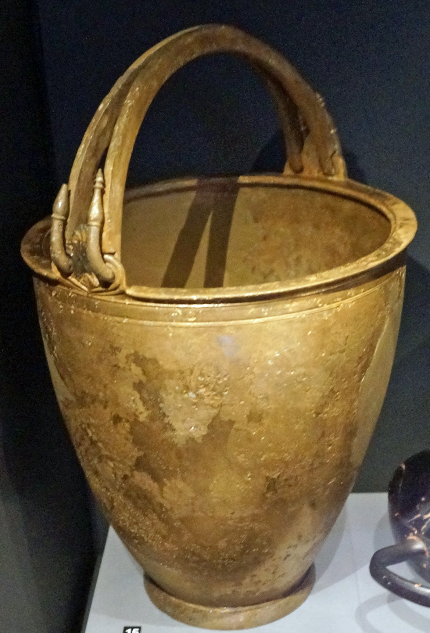 de la tombe Z à Derveni.